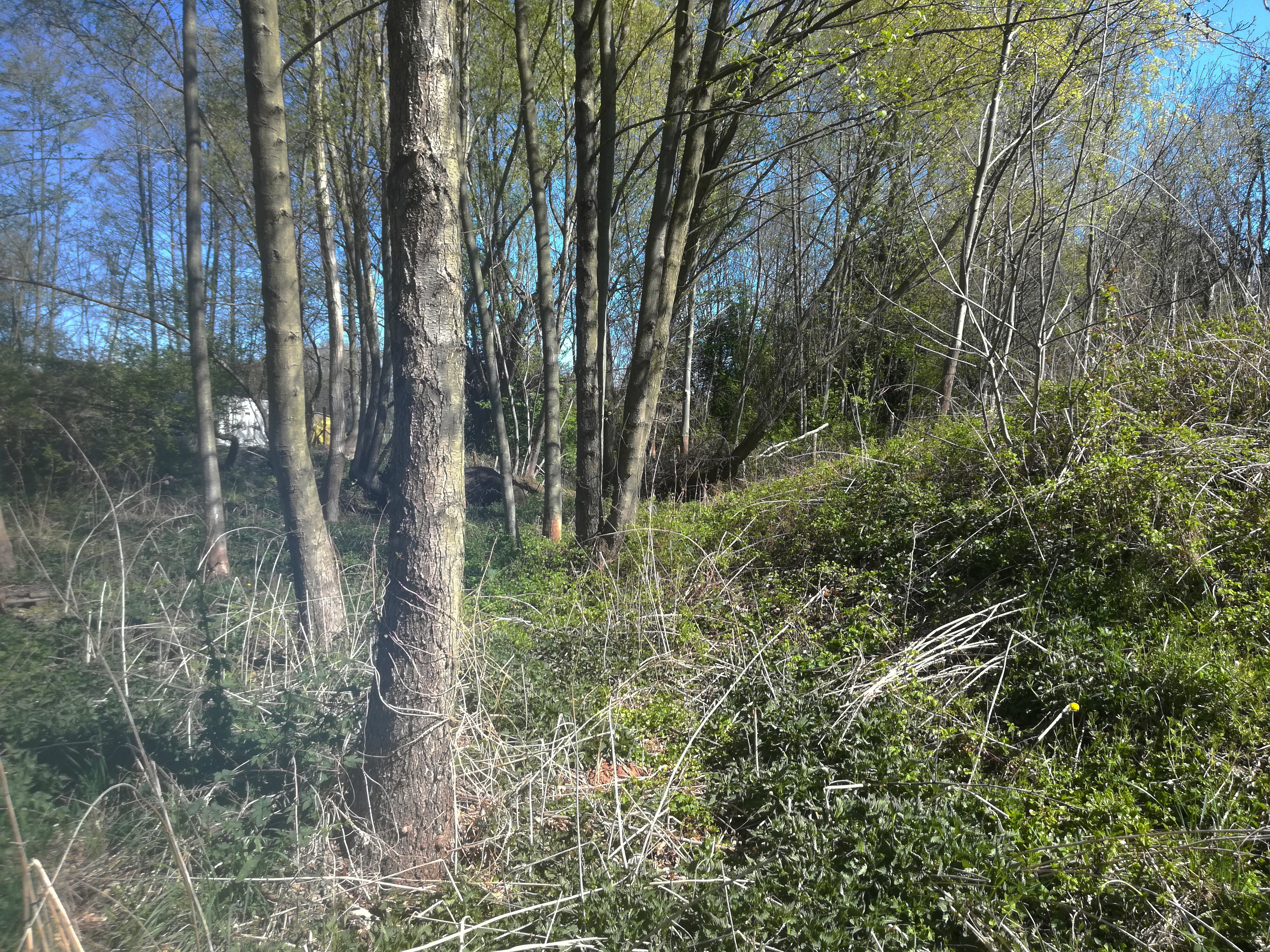 Terénní vlna představující část archeologické lokality Opatovický klášter, Opatovice nad Labem